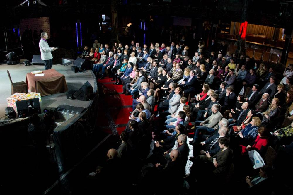 Лушников